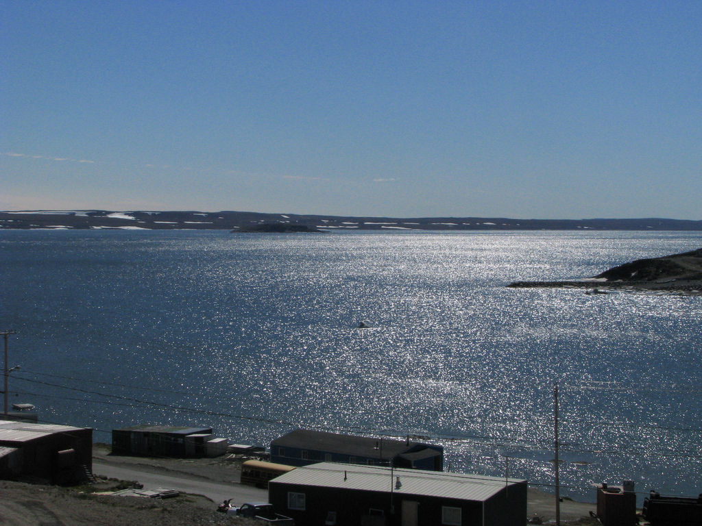 Payne River, Nunavuk.